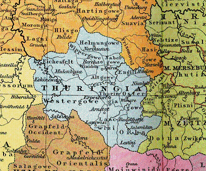 Ausschnitt (süd)thüringischer Gaue im Römischen Reich etwa 1000